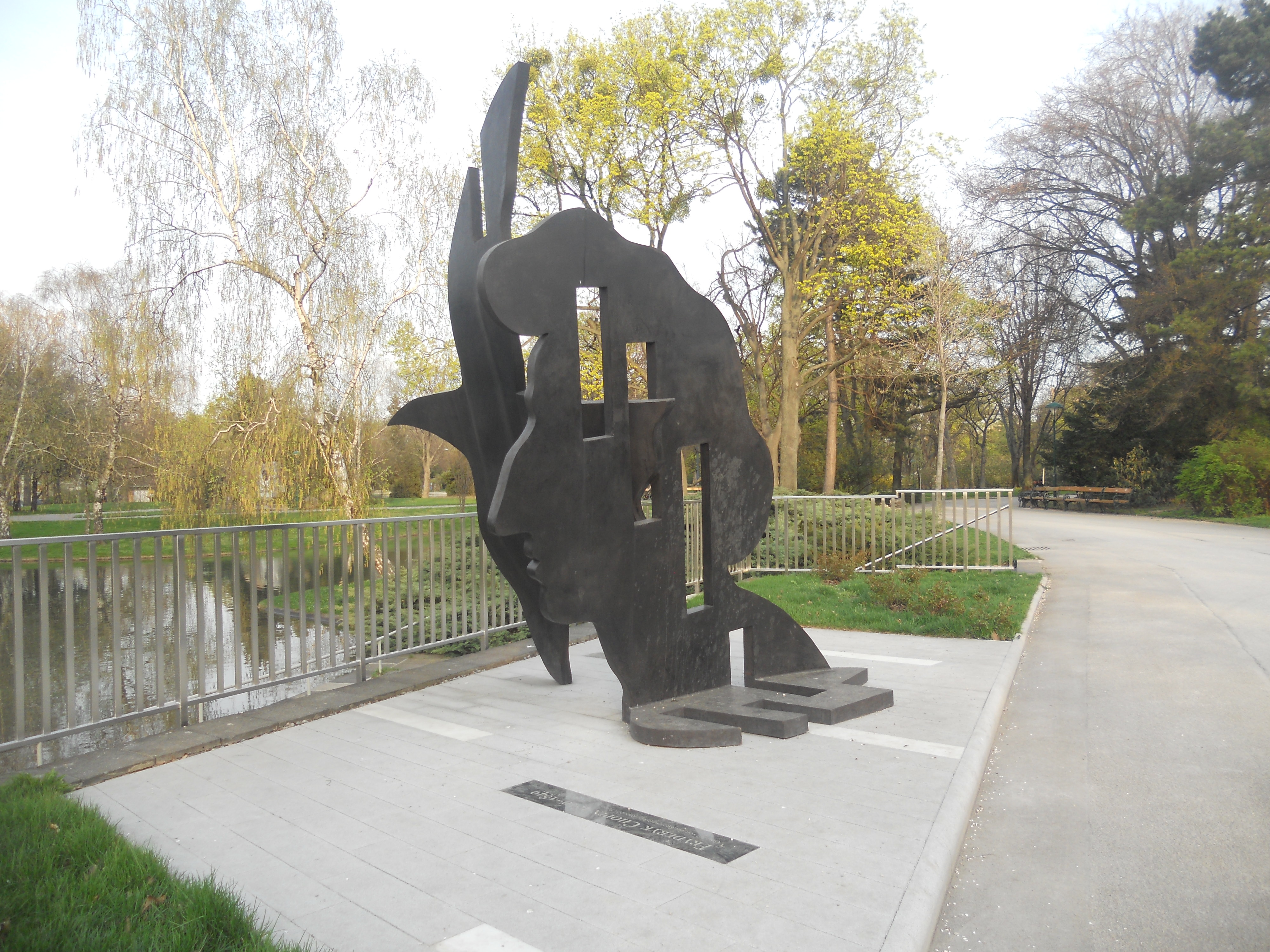 Chopindenkmal im Schweizergarten, auch genannt "La note bleue"